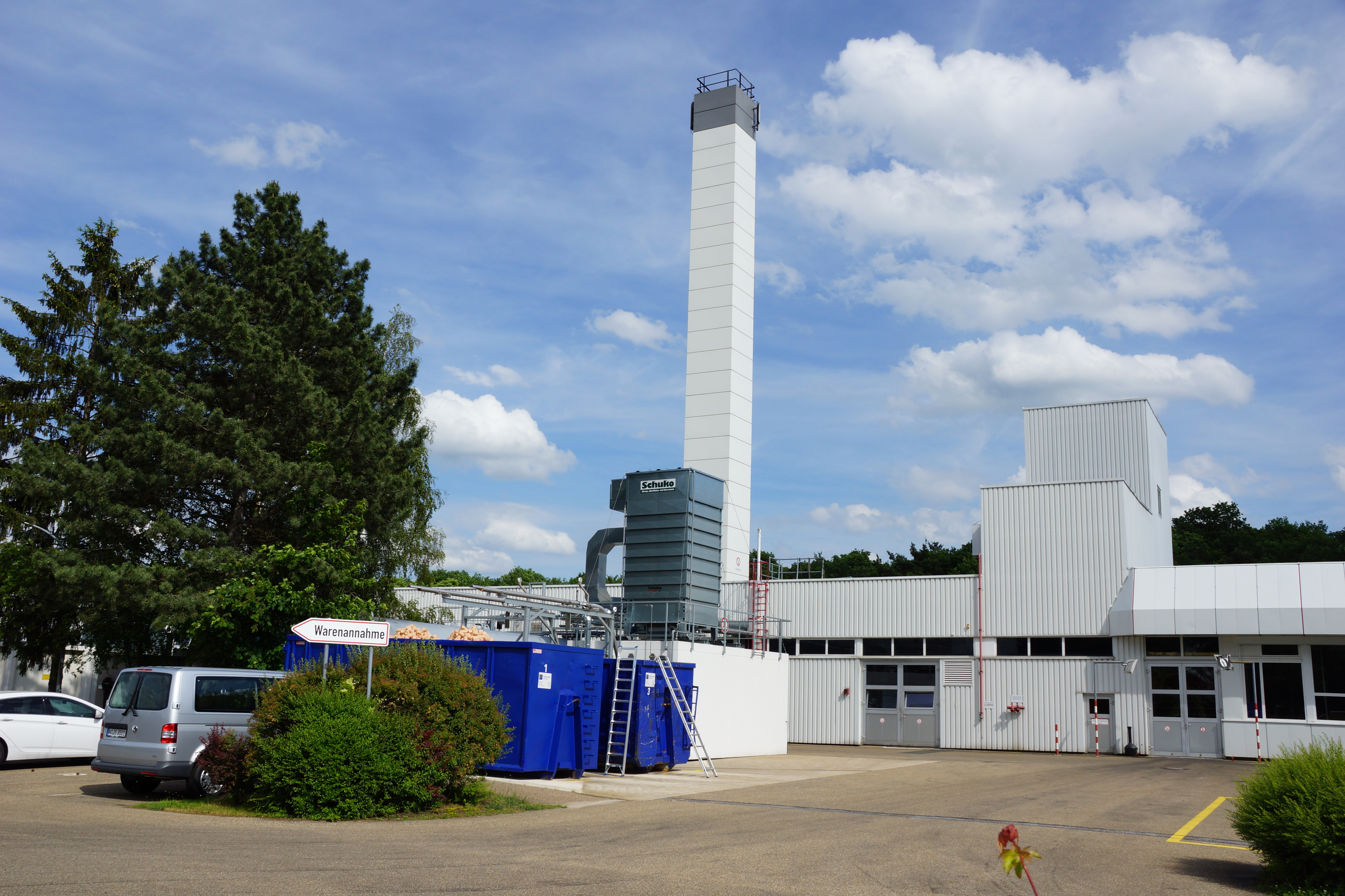 Die "Bleistift" (Bleistiftfabrik, ehemalige königliche Remontenanstalt) in Neumarkt in der EFA-Straße gehört heute zur Firma Staedtler.